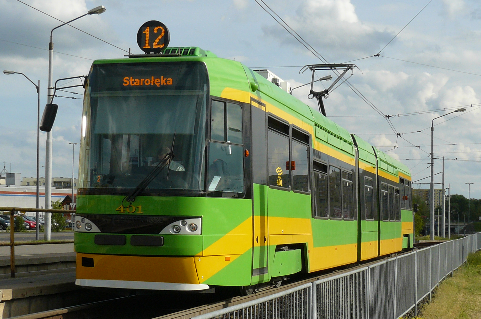 Tatra RT6N1 w Poznaniu (pętla PST).